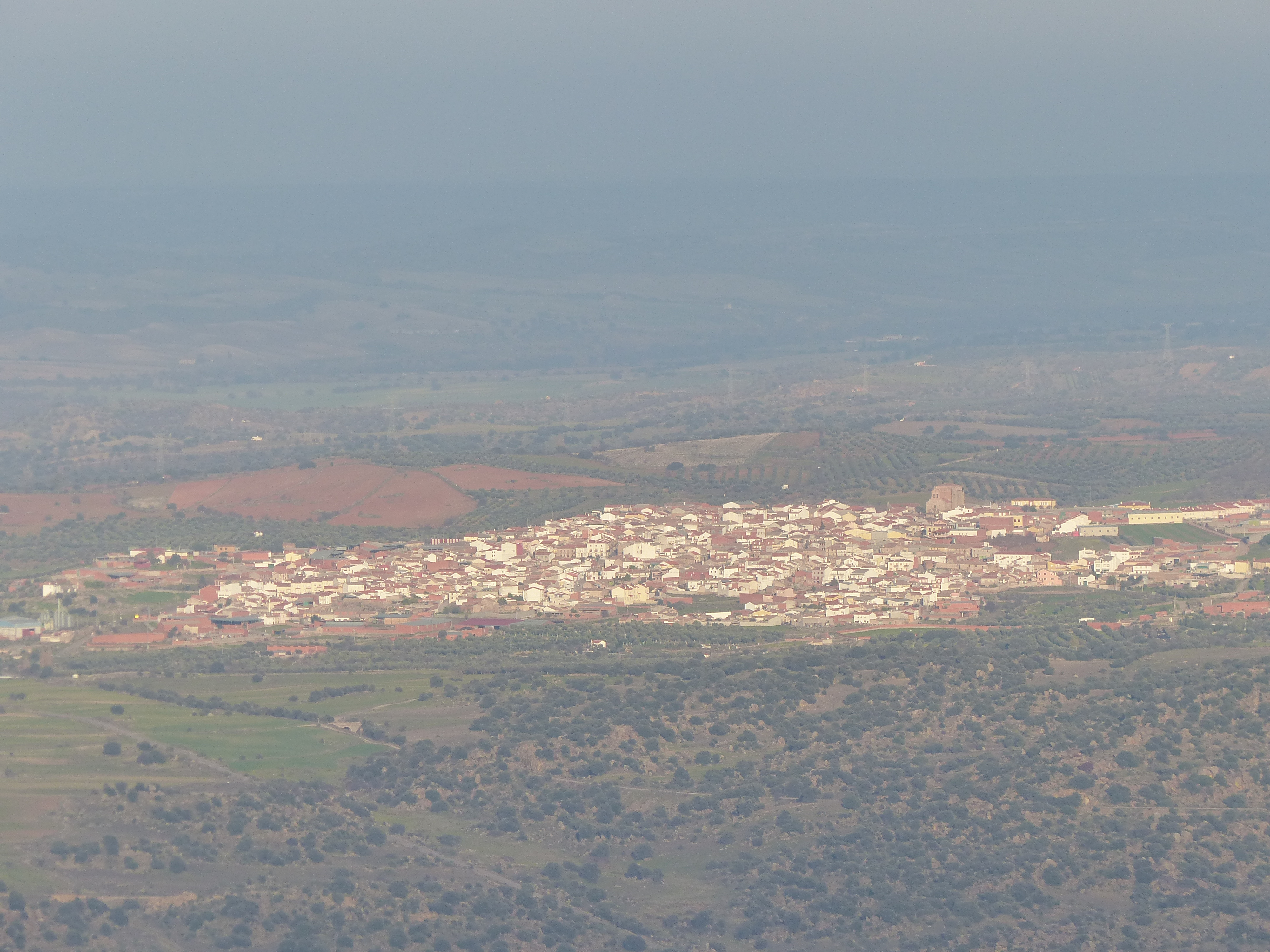 Aldeanueva de Barbarroya, Toledo, España. Fotografía tomada desde la cima de Sierra Ancha